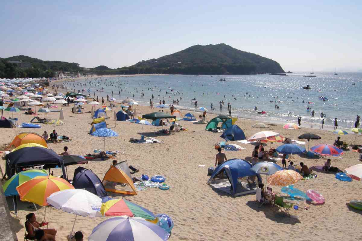 Goza-shirahama bathing beach, at Shima, Mie, Japan